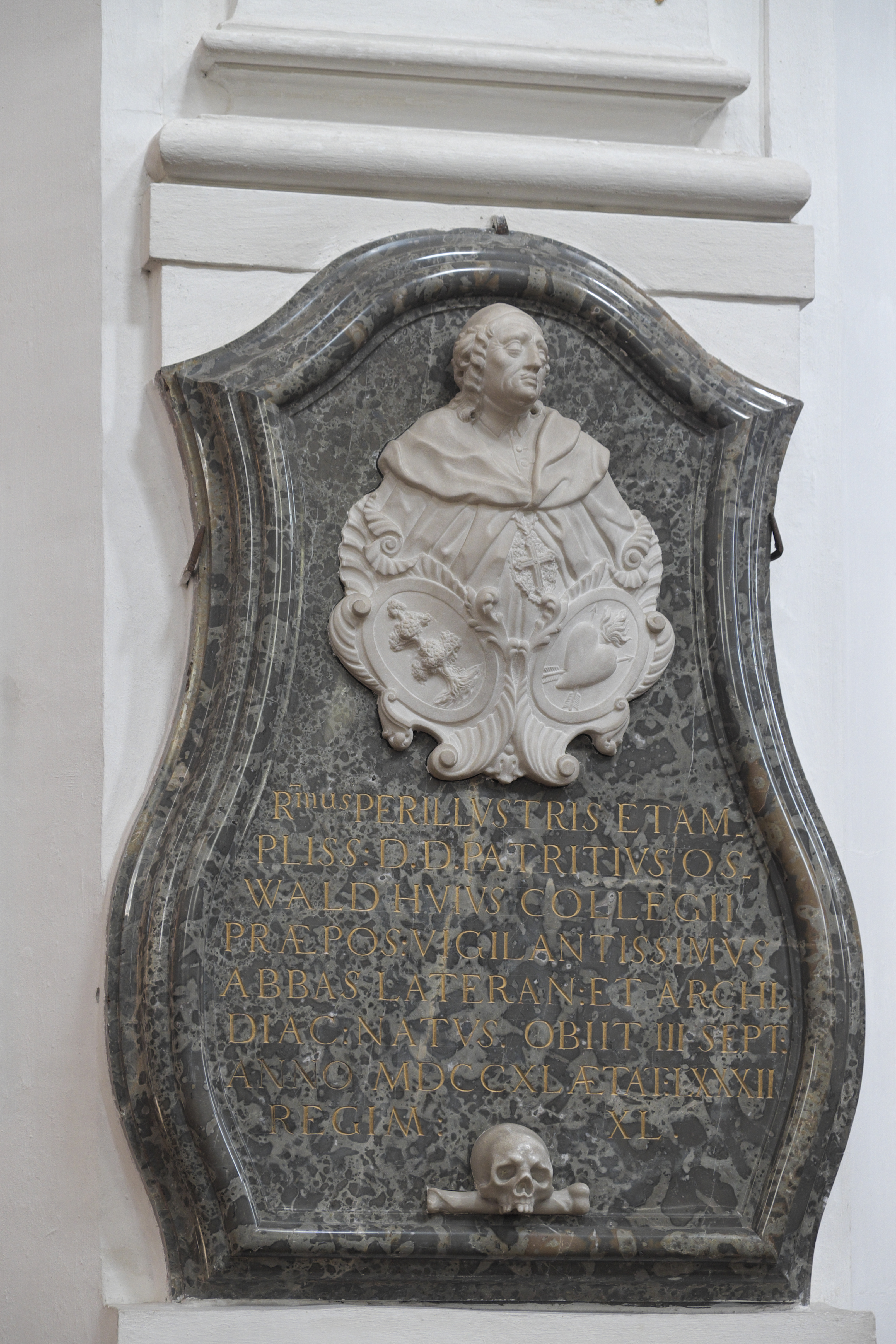 Katholische Pfarrkirche, ehemalige Augustiner-Chorherrenstiftskirche Mariä Geburt in Rottenbuch im Landkreis Weilheim-Schongau (Bayern/Deutschland), Epitaph für den Probst Patritius Oswald († 1740)